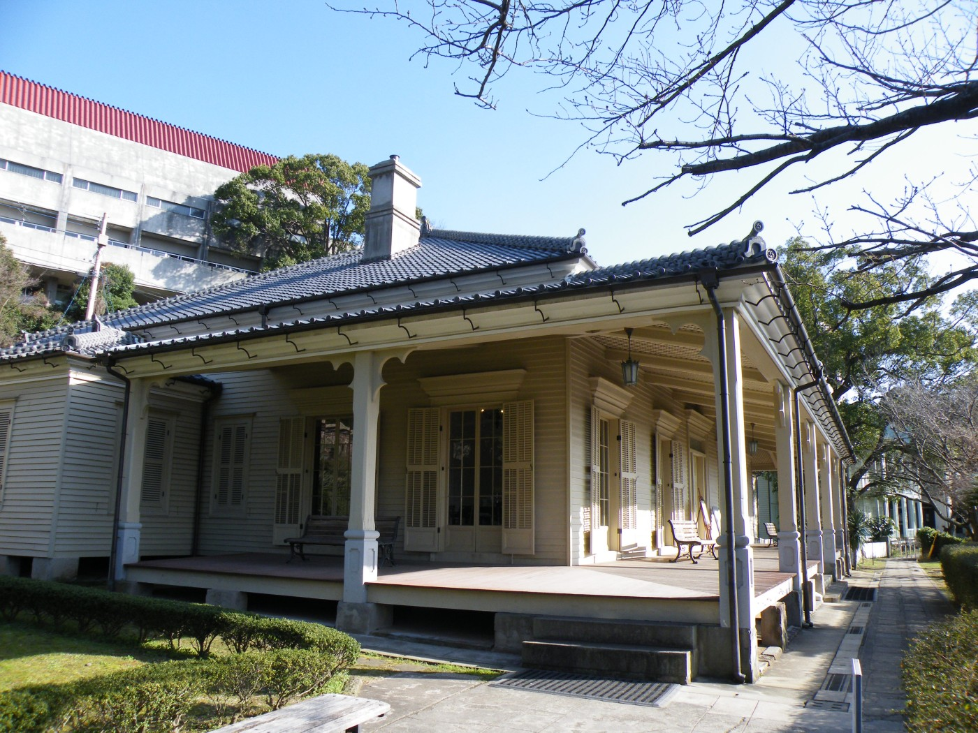 東山手十二番館（西側から撮影）：長崎県長崎市